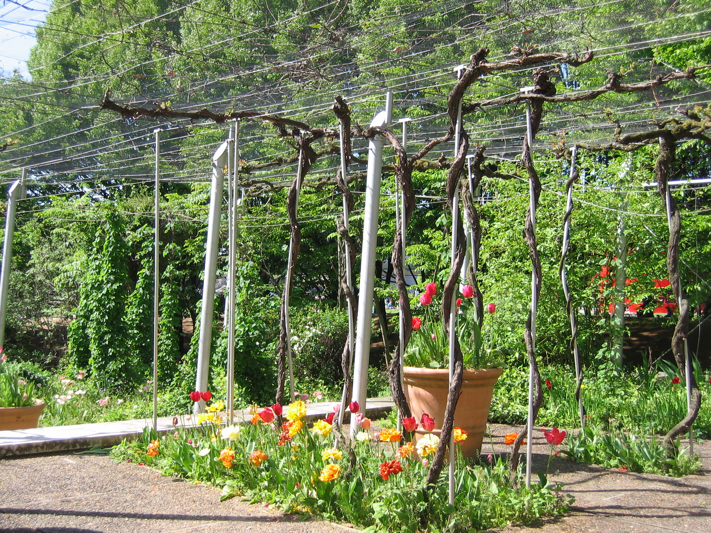 Jardin de la Treille Parc de la Villette